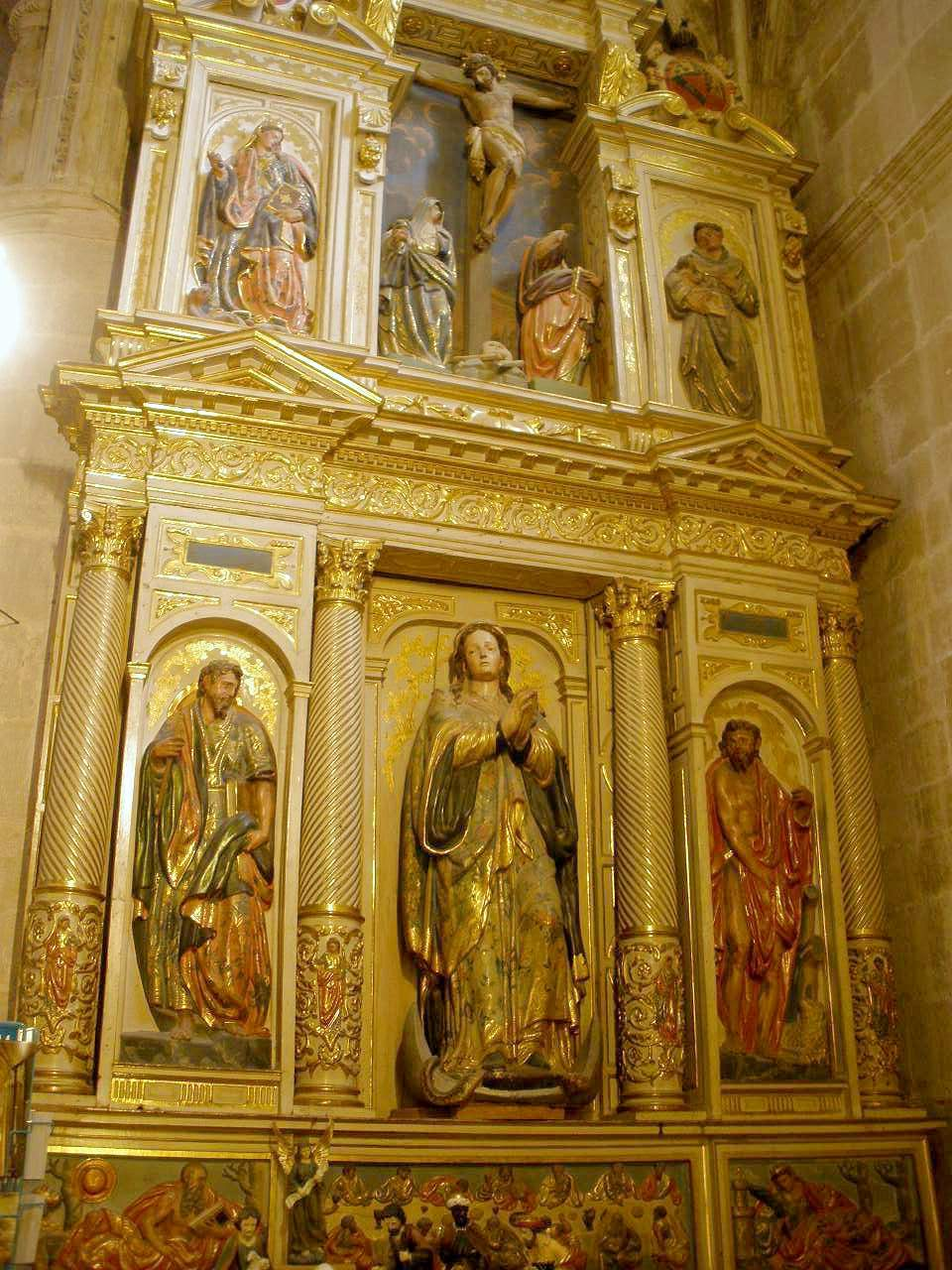 Concatedral del Salvador y Santa María, Santo Domingo de la Calzada (La Rioja). Retablo de la Capilla de la Inmaculada